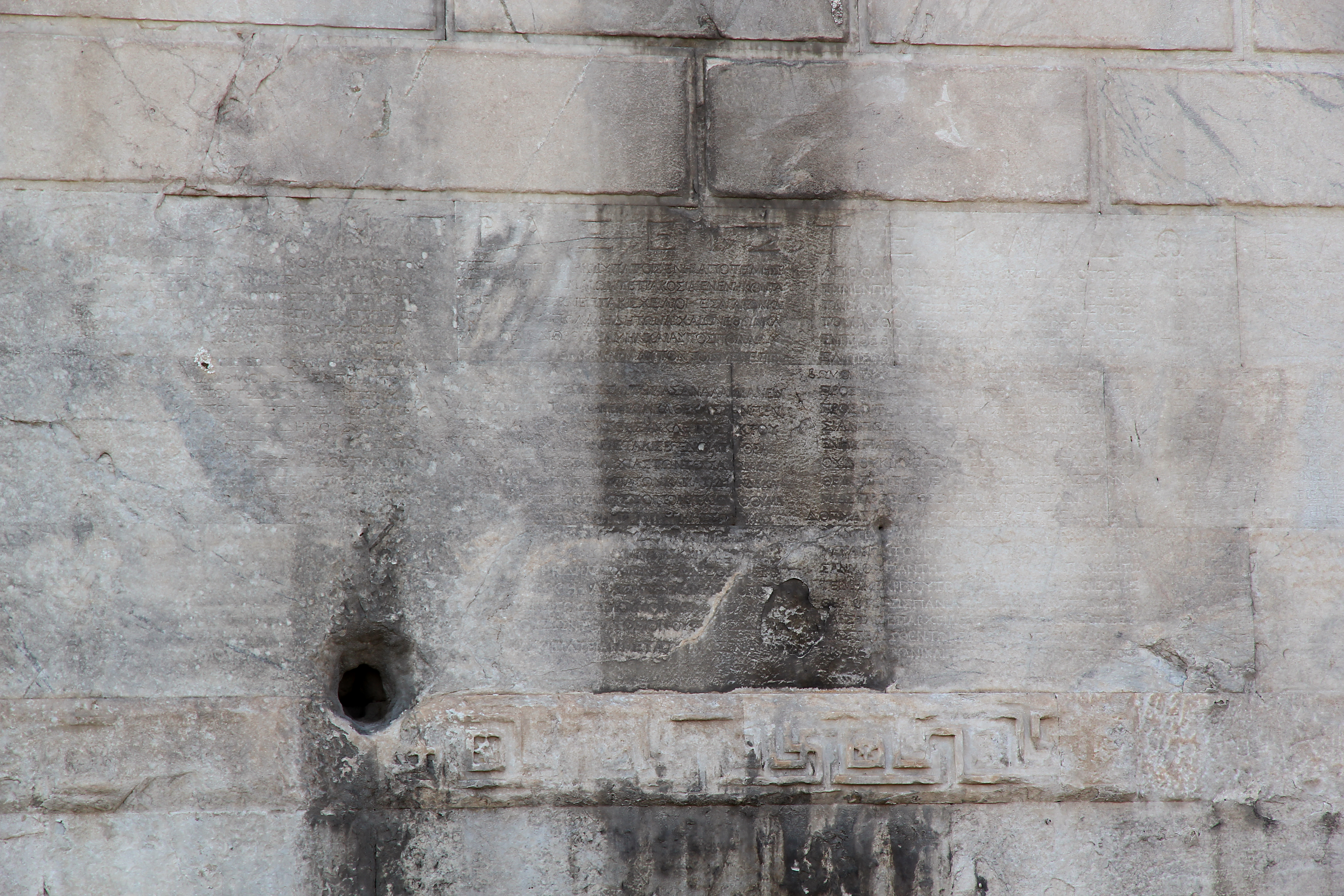 Tempel der Roma und des Augustus, Ankara, Türkei, Außenwand (Südosten) Ausschnitt aus der griechischen Version der Res gestae divi Augusti